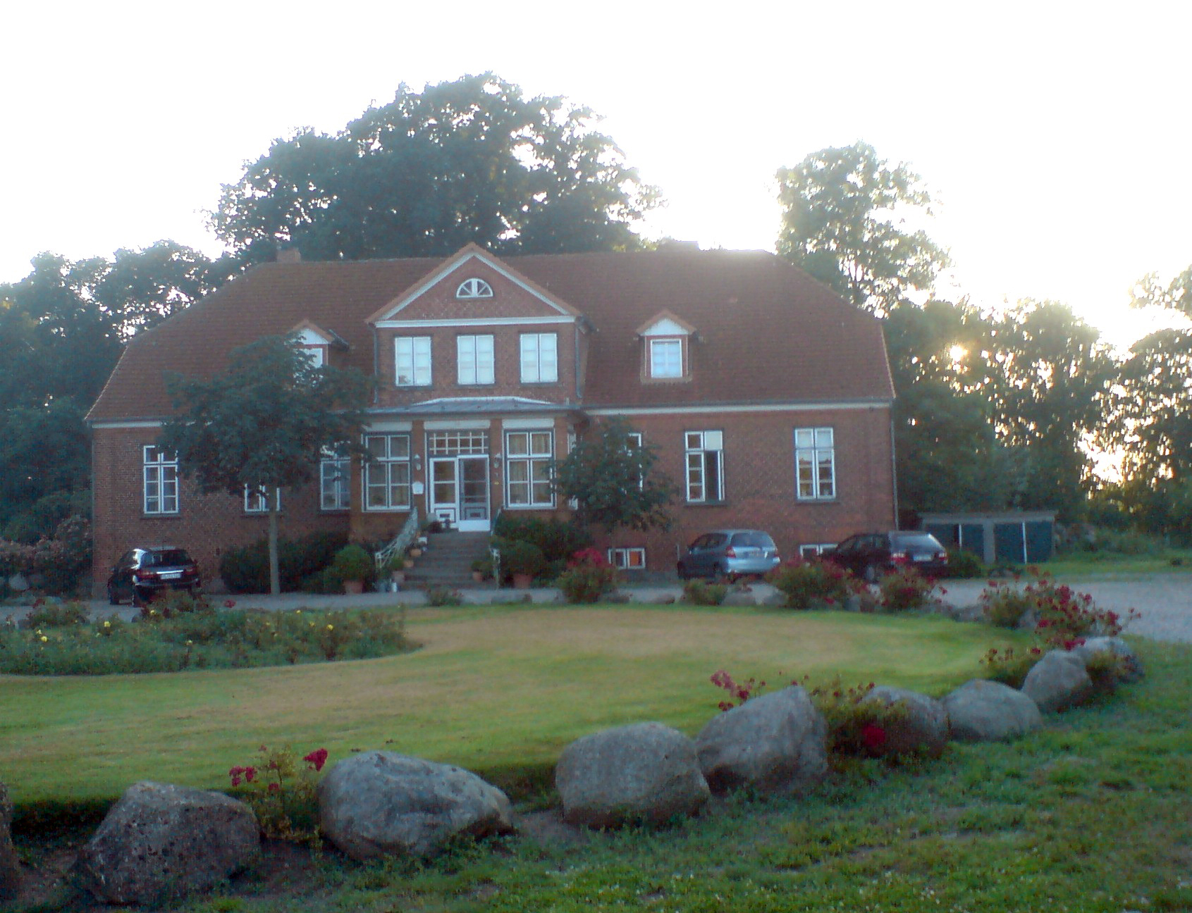 Herrenhaus auf Gut Alt-Bülk